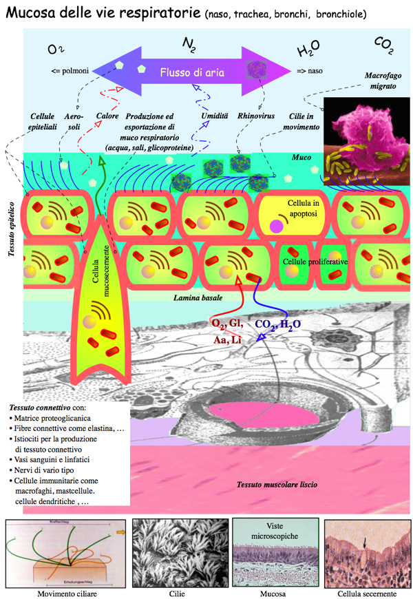 Grafica: Medicina: Respirazione: Mucosa delle vie respiratorie: Grafica: Medicina: Apparato respiratorio: Anatomia, fisiologia: Mucosa delle vie respiratorie: sostanze, scambio, cellule, epiteliali, secernenti, muco, cilie, tessuto connettivo lasso, muscoli lisci